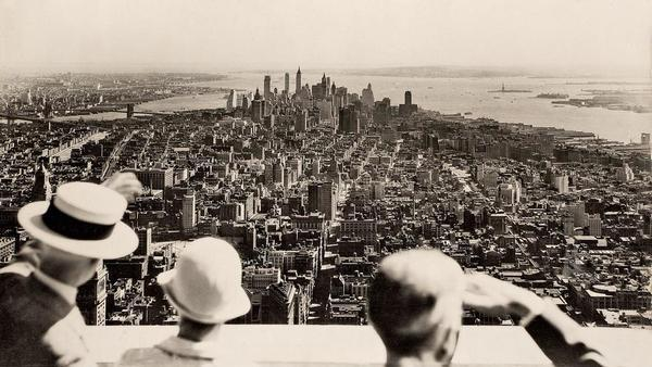 Вид на Нью-Йорк с Эмпайр-стейт-билдинг в день открытия